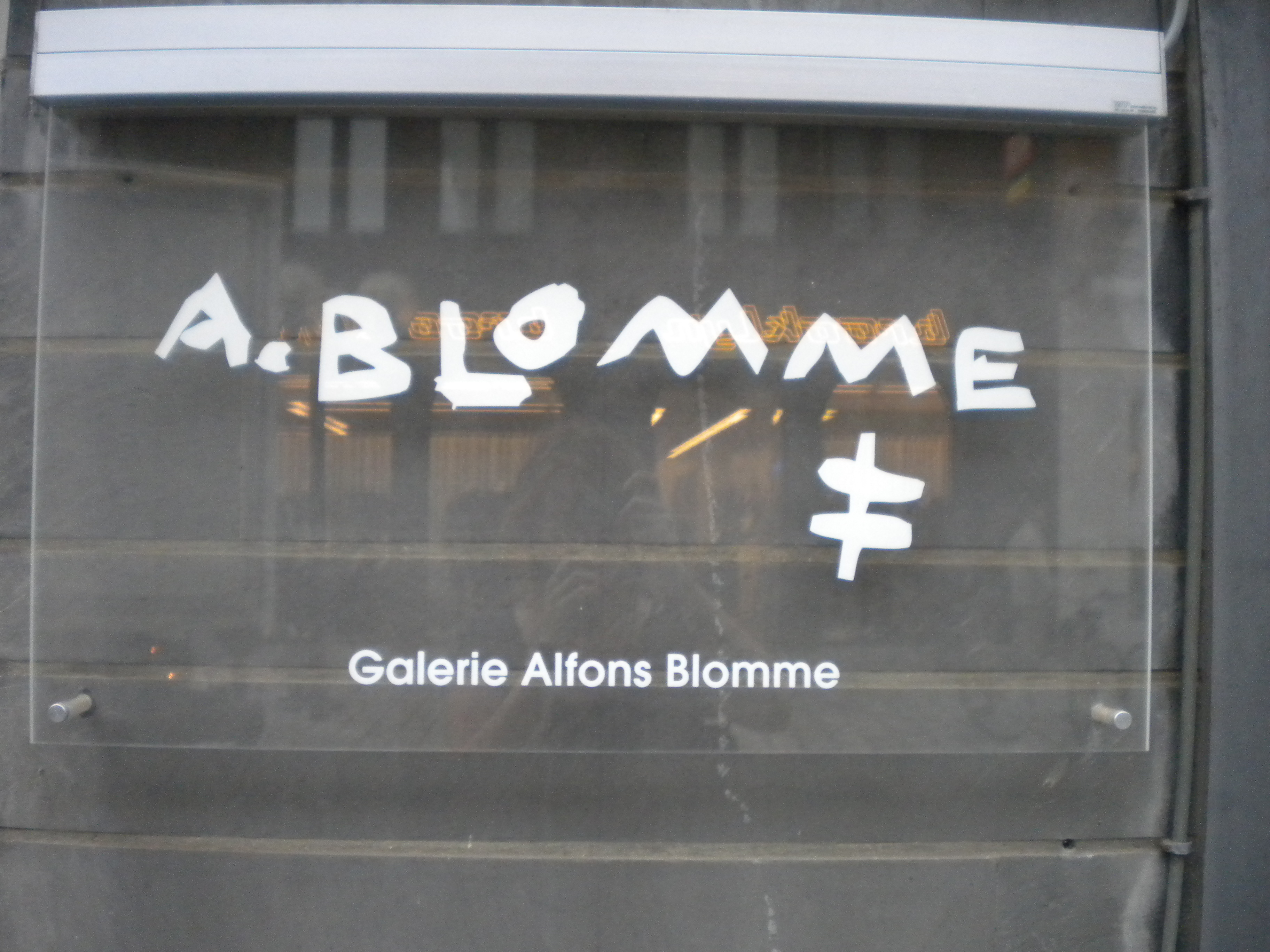 Galerij Alfons Blomme 2